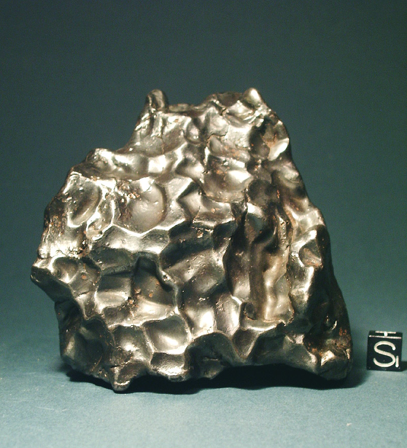 Sikhote alin Eisenmeteorit 1,3 kg, Maßstabswürfel 1cm